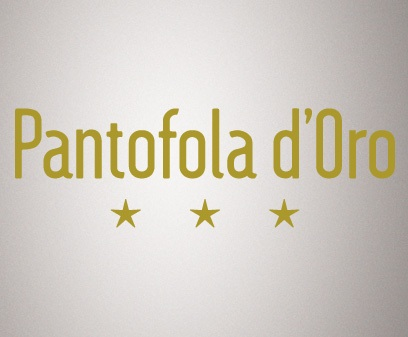 Pantofola d'oro